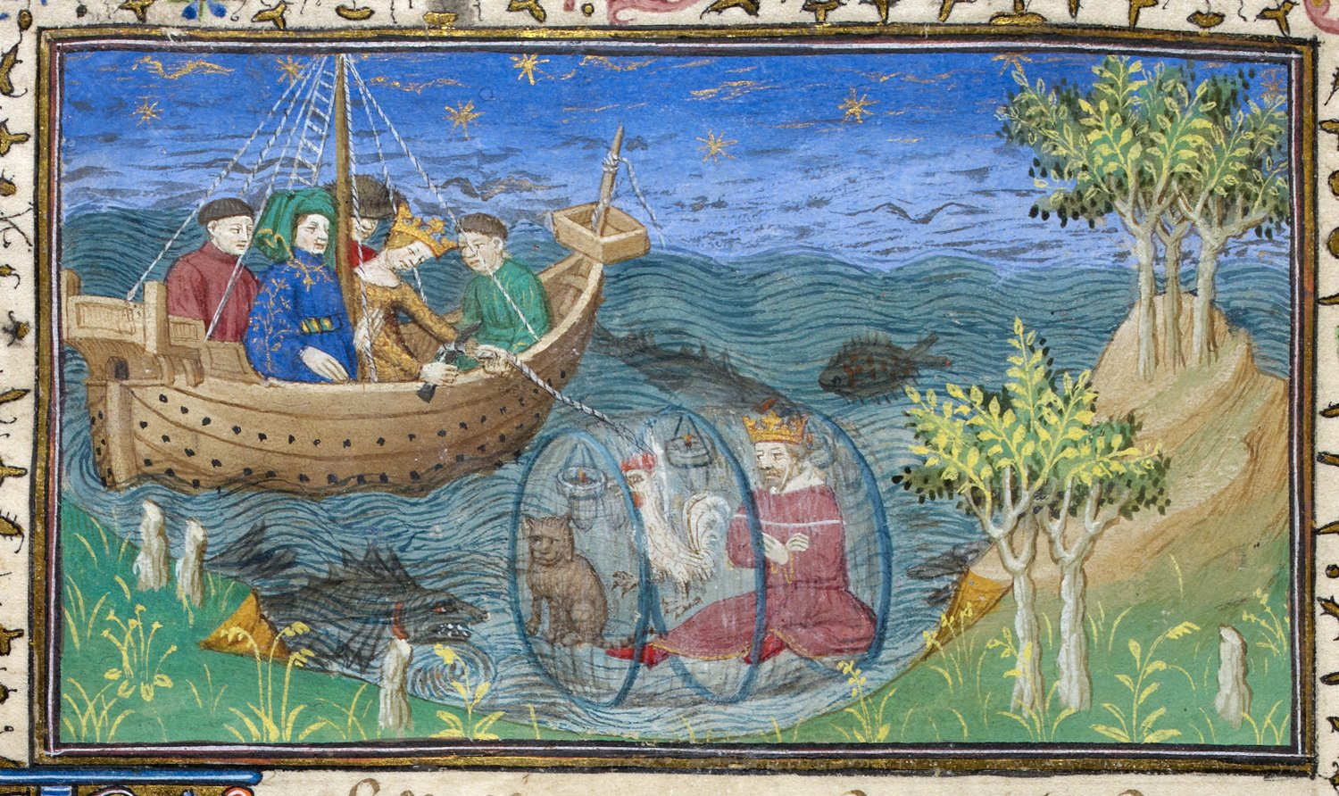 Detail of a miniature of Alexander lowered into the sea in a cask, along with a cat and a cock, at the beginning of chapter 65. Source: Historia de proelis in a French translation (Le Livre et le vraye hystoire du bon roy Alixandre), 1420.